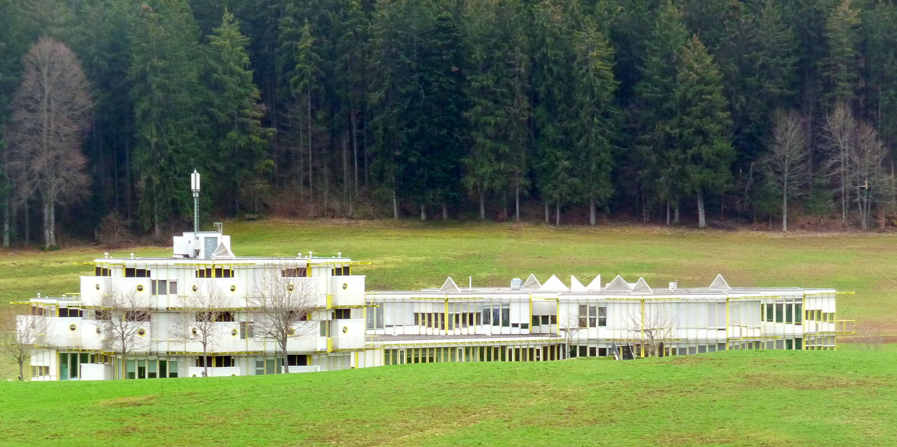 Vue du CIP à Tramelan (avril 2012)